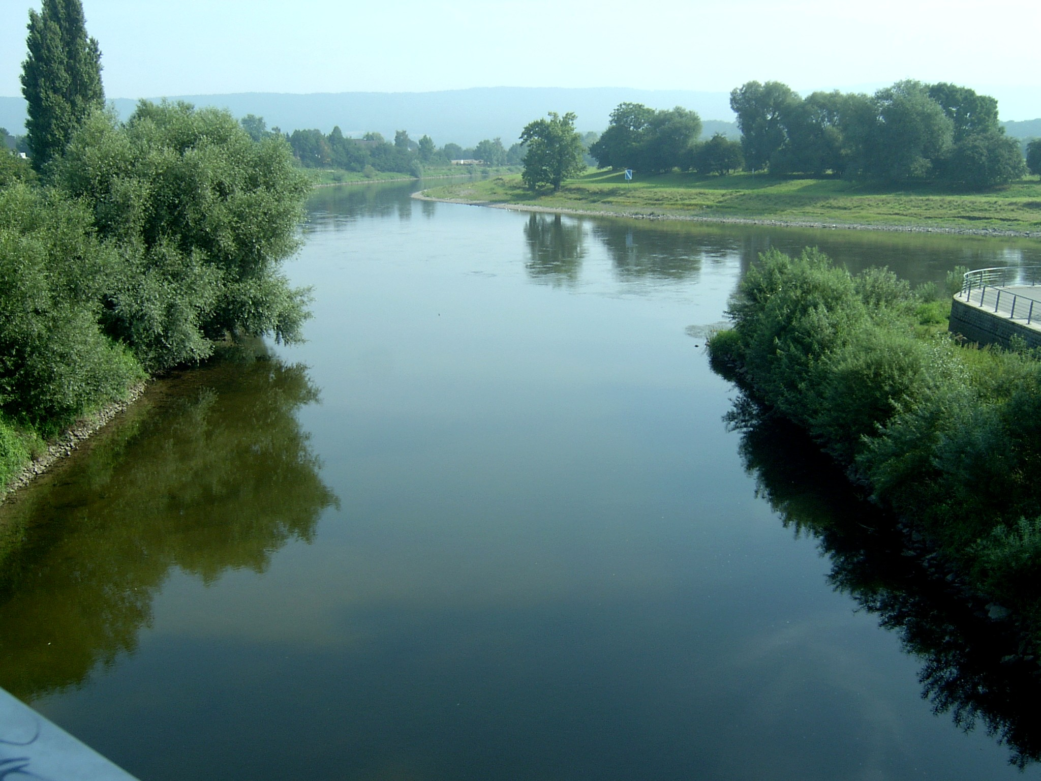 Werre-Weser-Kuss in Bad Oeynhausen